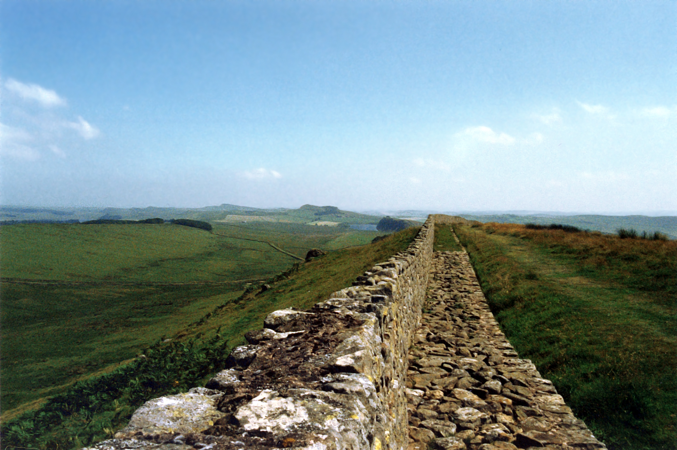 Der Hadrianswall auf dem Windshields Crag, dem höchsten Punkt dieser Limeslinie; zwischen Meilenkastell 42 und Turmstelle 39b. Deutlich sichtbar ist die ursprüngliche Breite der Limesmauer.